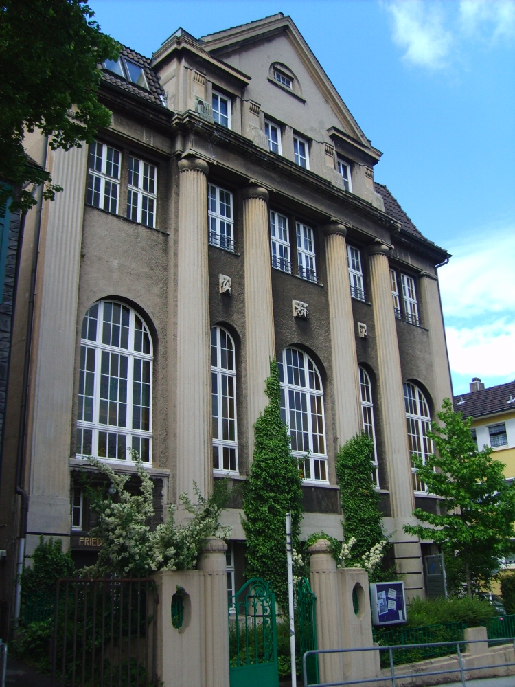 Friedensheim, Wuppertal-Barmen, Germany